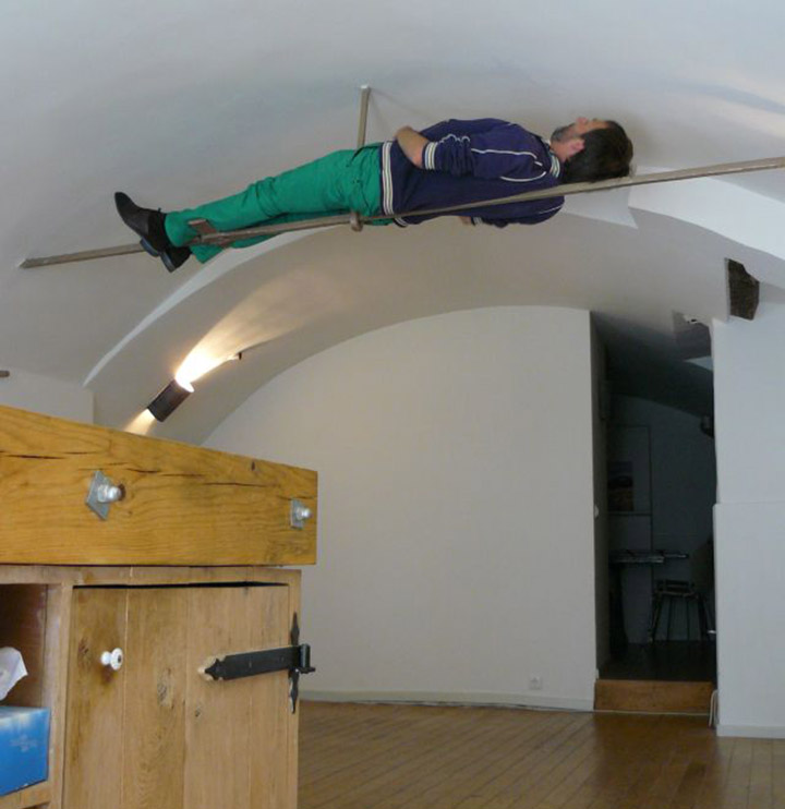 Pielage tijdens een performance, liggend op een trekstang in een Utrechtse werfkelder, augustus 2013.